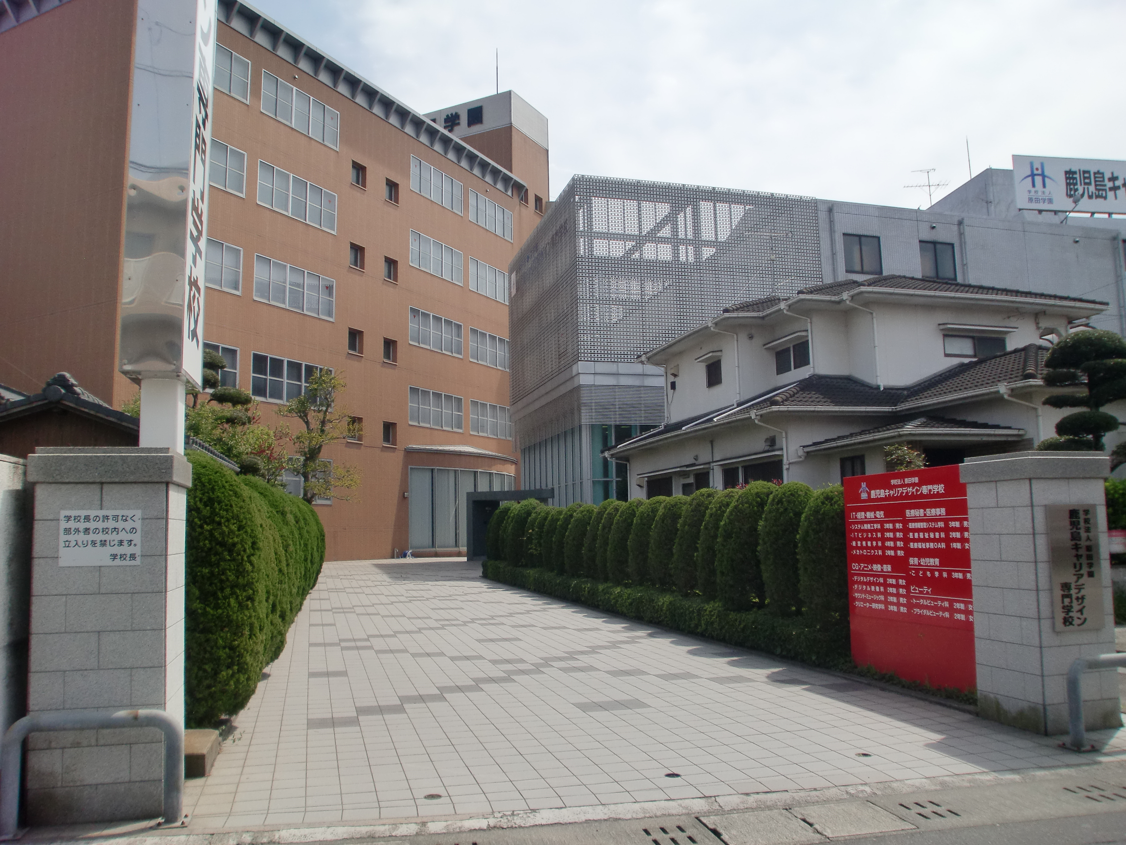 鹿児島キャリアデザイン専門学校の本部の外観。